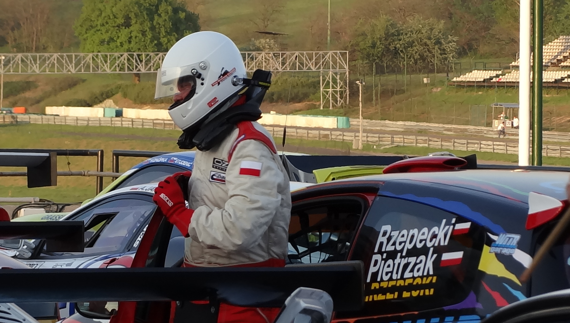 Maciej Roch Pietrzak. Hungaroring 2012.